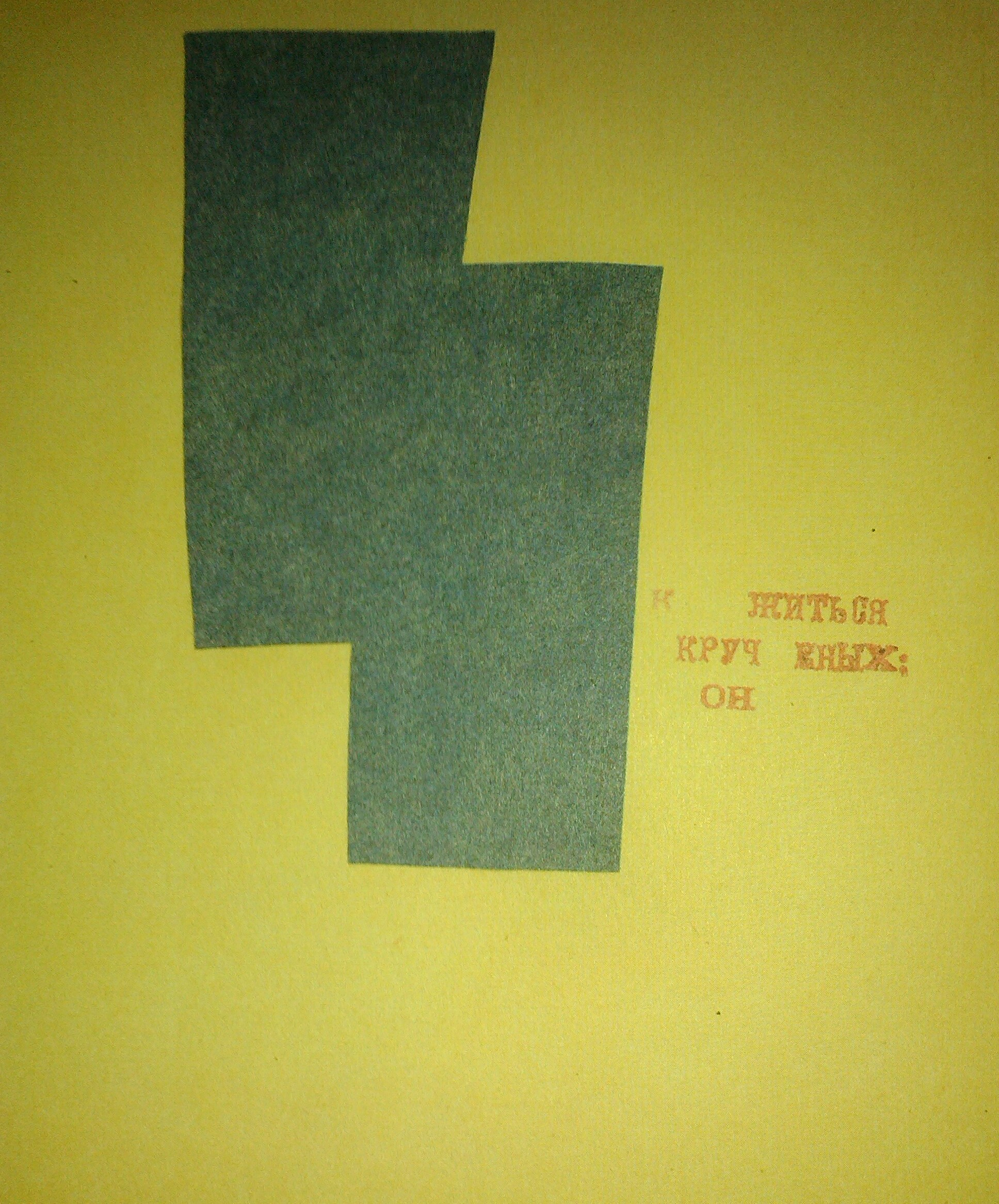 Коллаж Крученых из книги "Заумная гнига"